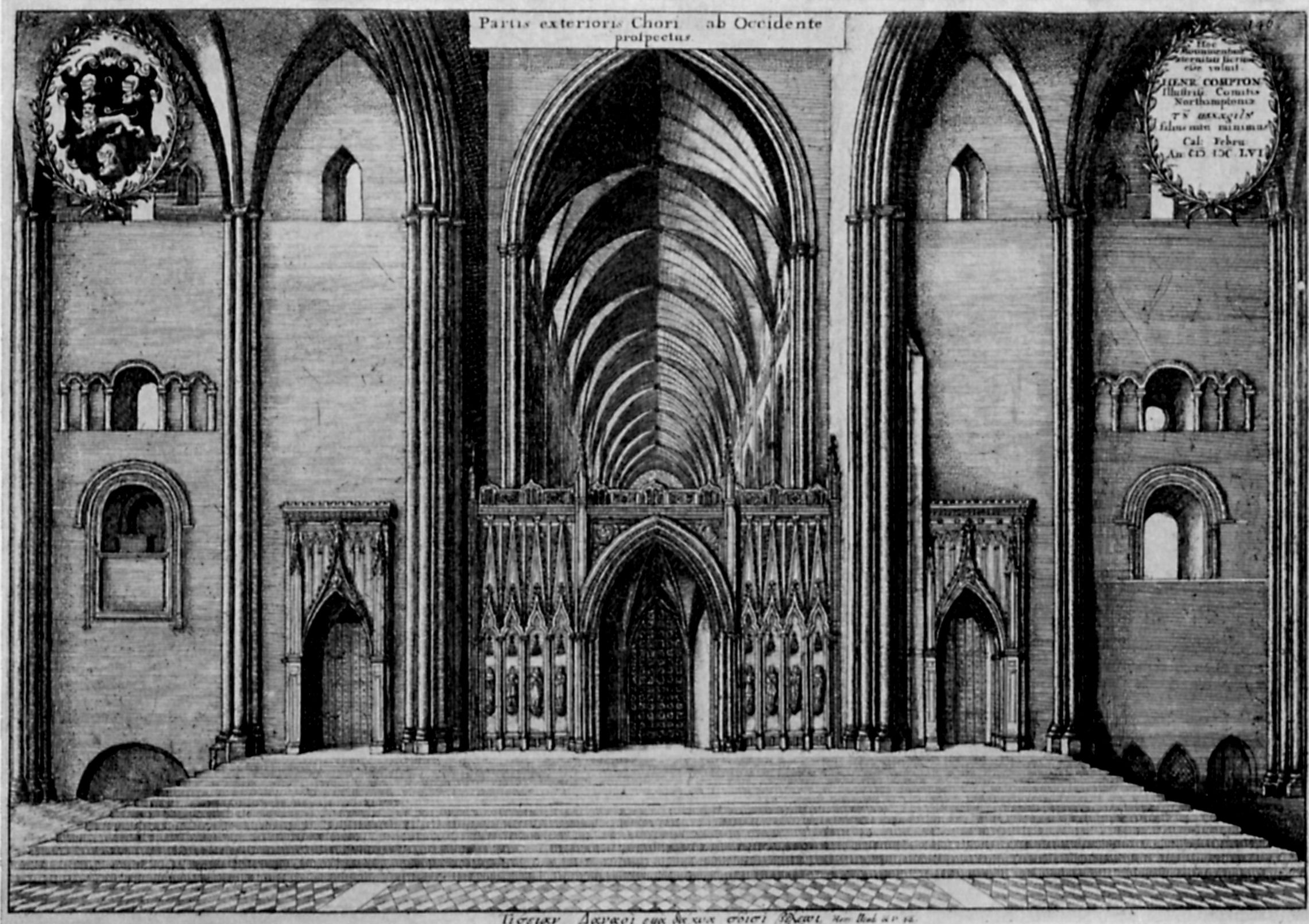 Old St Paul's Cathedral